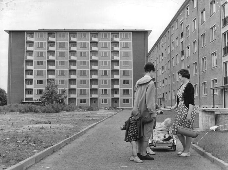 Dresden Appartmenthochhaus Striesener Straße Ecke Marschner Straße, Johannstadt Zentralbild-Weidauer Me-Qu 25.7.1960 Neues Wohnhochhaus in Dresden Das neuerbaute Stadtviertel Dresden-Johannstadt bekommt seine besondere architektonische Note durch das neue Wohnhochhaus mit 8 Geschossen. Es ist das erste von einer AWG gebaute Wohnhochhochhaus in der DDR. Das Hochhaus hat 96 Kleinstwohnungen mit 1, 1 1,5, und 2 Zimmerwohnungen. Sämtliche Wohnugen sind dampfbeheizt und mit Warmwasserspeicher versehen. Das Haus hat Personenaufzug und Müllschlucker, im Keller befinden sich Waschmaschinen. UBz. Das Wohnhaus wird bis Ende September schlüsselfertig den Mietern übergeben.